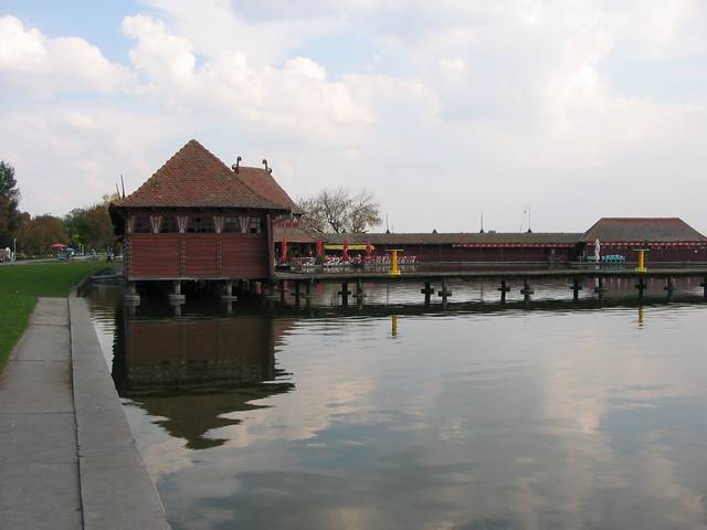 Palić